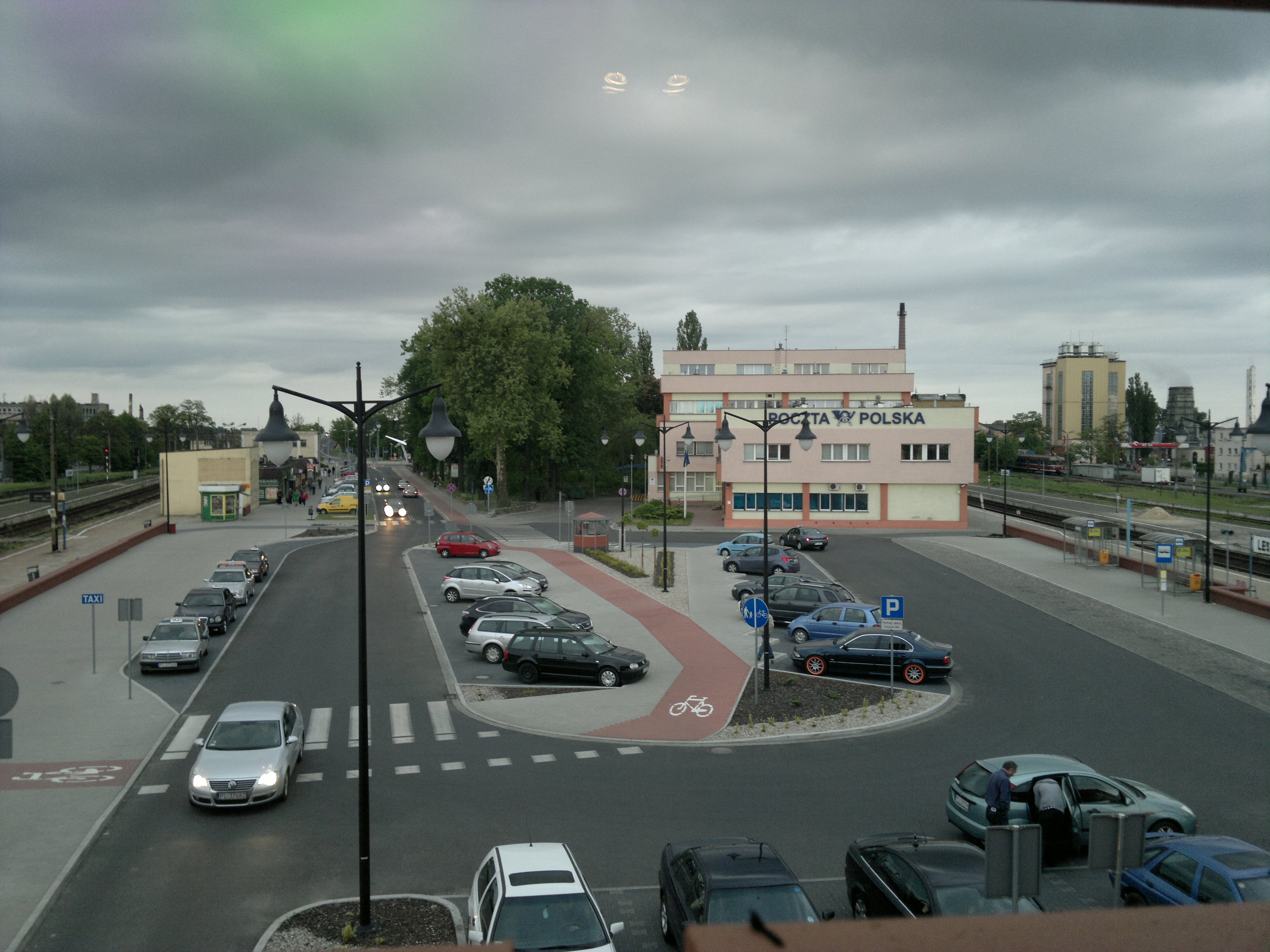 Polska, woj. wielkopolskie, Leszno, Plac przed zmodernizowanym dworcem kolejowym (widok z tarasu budynku)